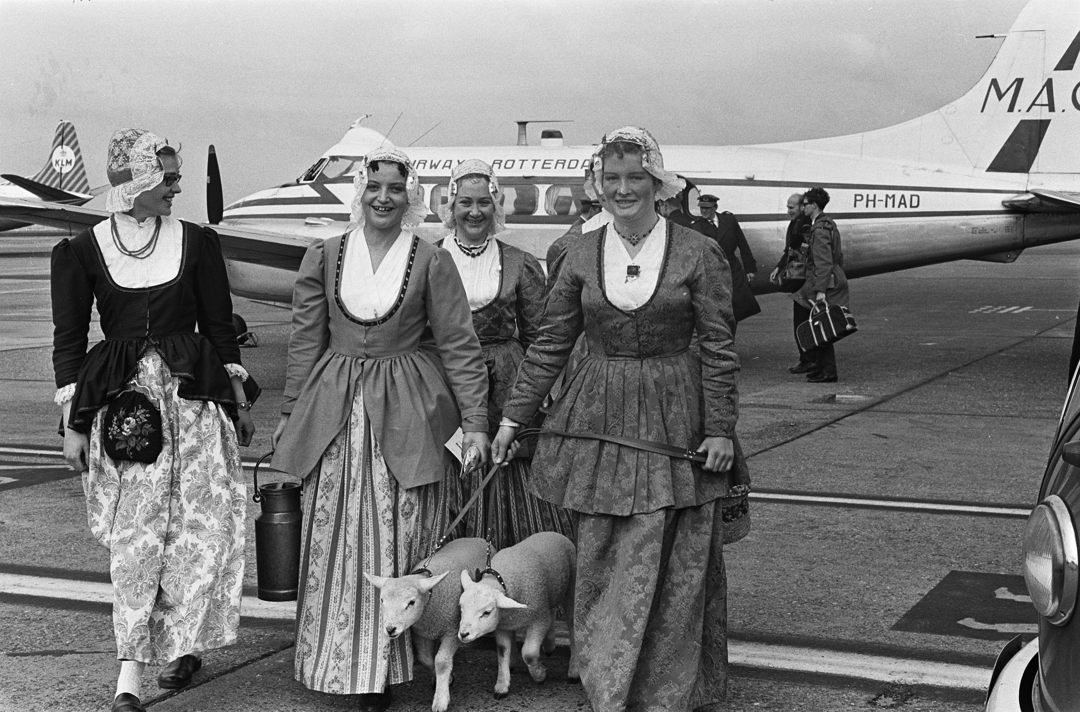 Collectie / Archief : Fotocollectie Anefo Reportage / Serie : [ onbekend ] Beschrijving : Vijf meisjes in Texels kostuum op Schiphol met twee lammetjes Datum : 5 mei 1964 Locatie : Noord-Holland, Schiphol Trefwoorden : MEISJES, kostuums Fotograaf : Pot, Harry / Anefo Auteursrechthebbende : Nationaal Archief Materiaalsoort : Negatief (zwart/wit) Nummer archiefinventaris : bekijk toegang 2.24.01.05 Bestanddeelnummer : 916-3943 Reacties Geplaatst door Maaike op 26 juli 2013 - 17:41. 550-jarig bestaan van Texel waar bekendheid aan wordt gegeven in Amsterdam. Met een binnenlandse vlucht kwamen de Texelse schonen in gezelschap van twee Texelse lammetjes, aan op Schiphol. Trefwoorden: streekdrachten; jubilea